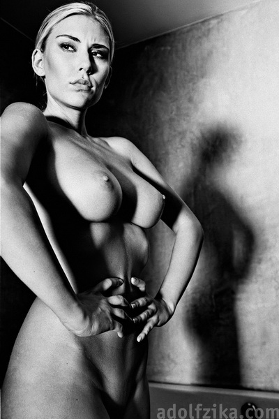 Fotografie z archivu Adolfa Ziky